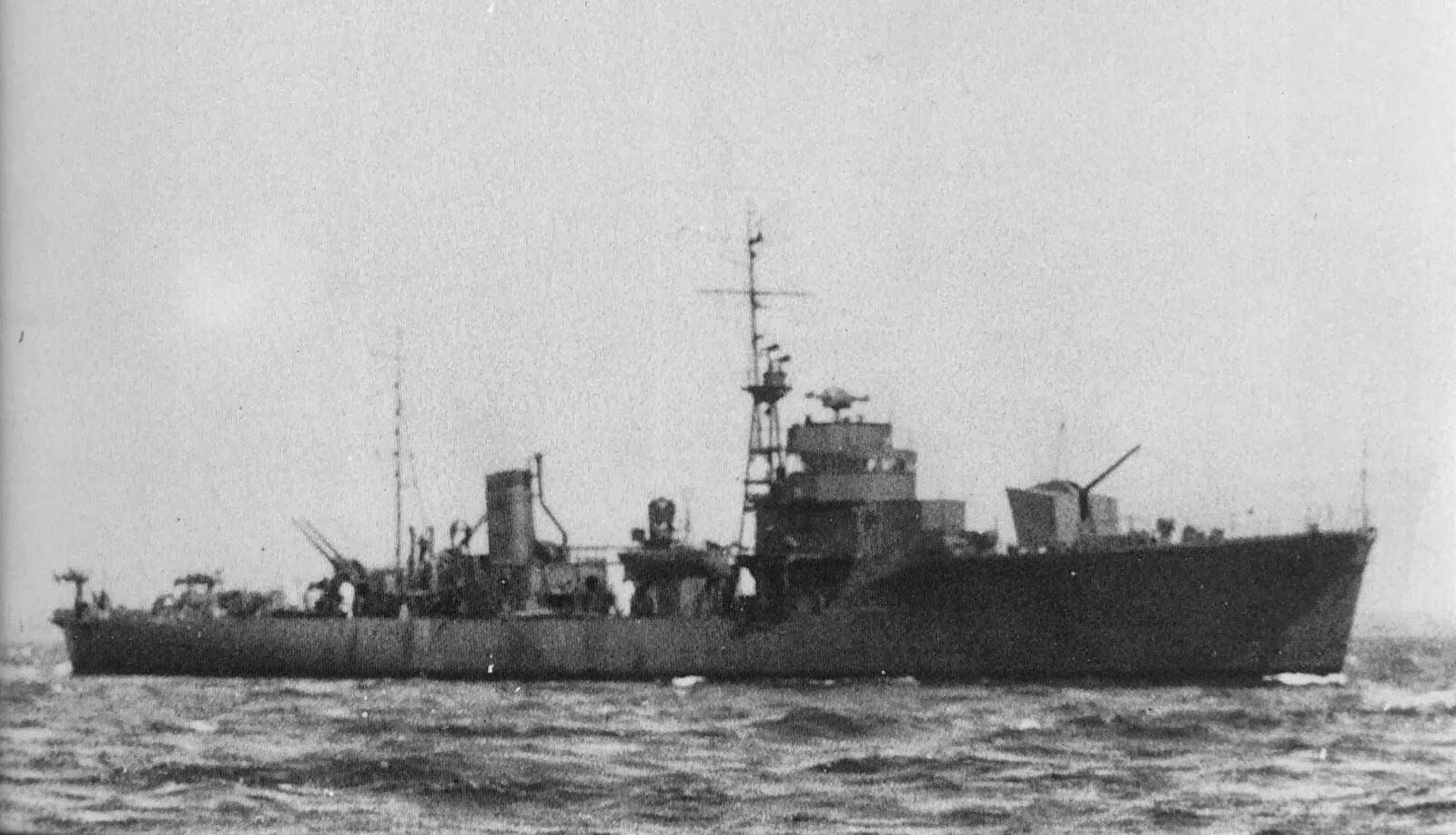 日本海軍御蔵型海防艦『倉橋』、東京湾